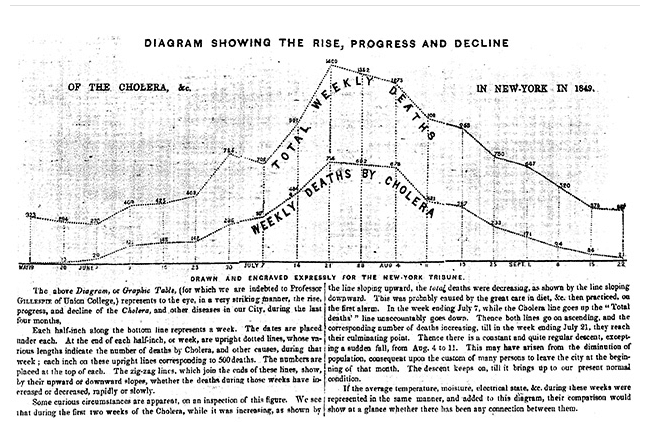 Gráfico que apresenta relação de casos de cólera com o número de óbitos de uma determinada cidade em 1849.